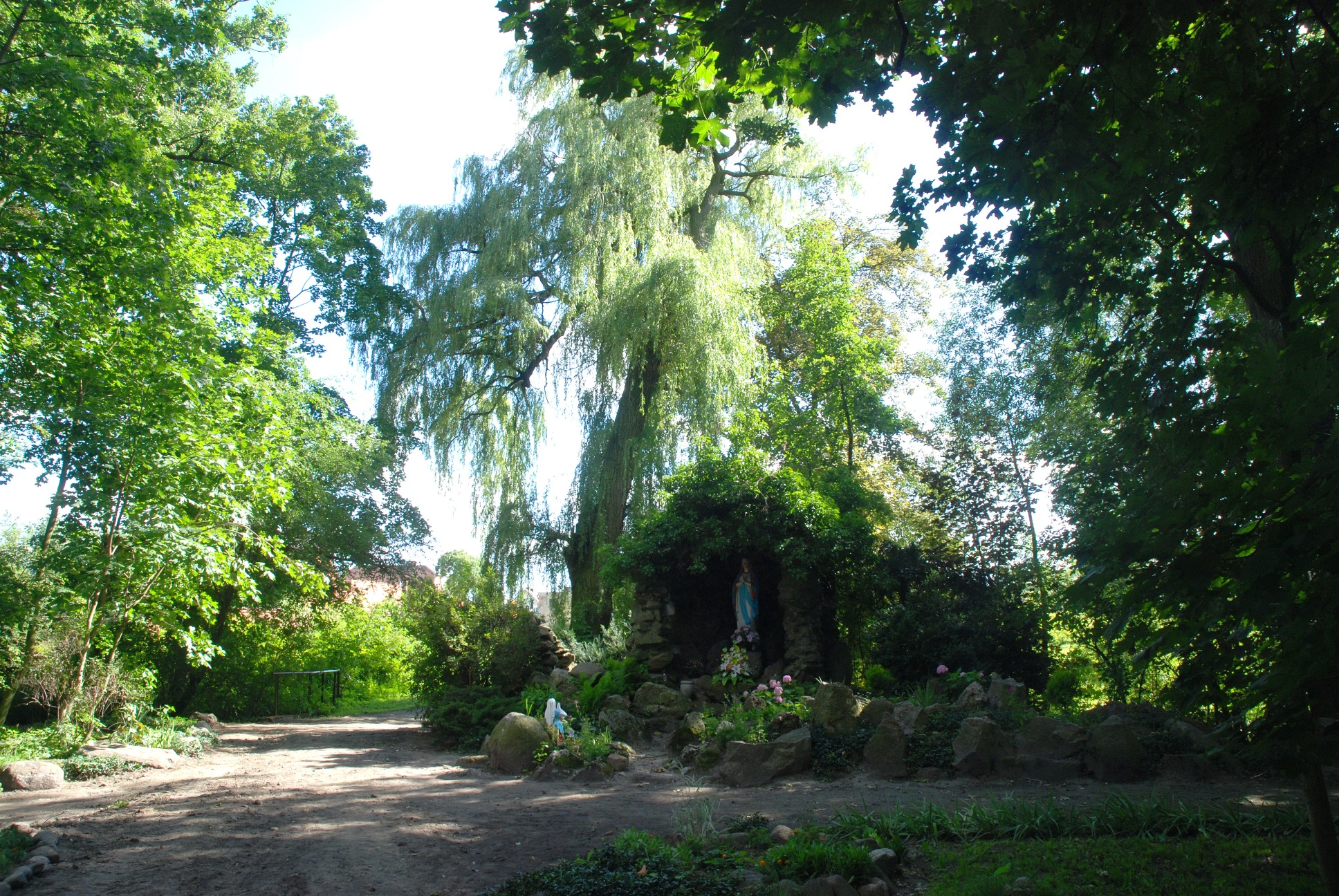 Bruczków - park w zespole pałacowym